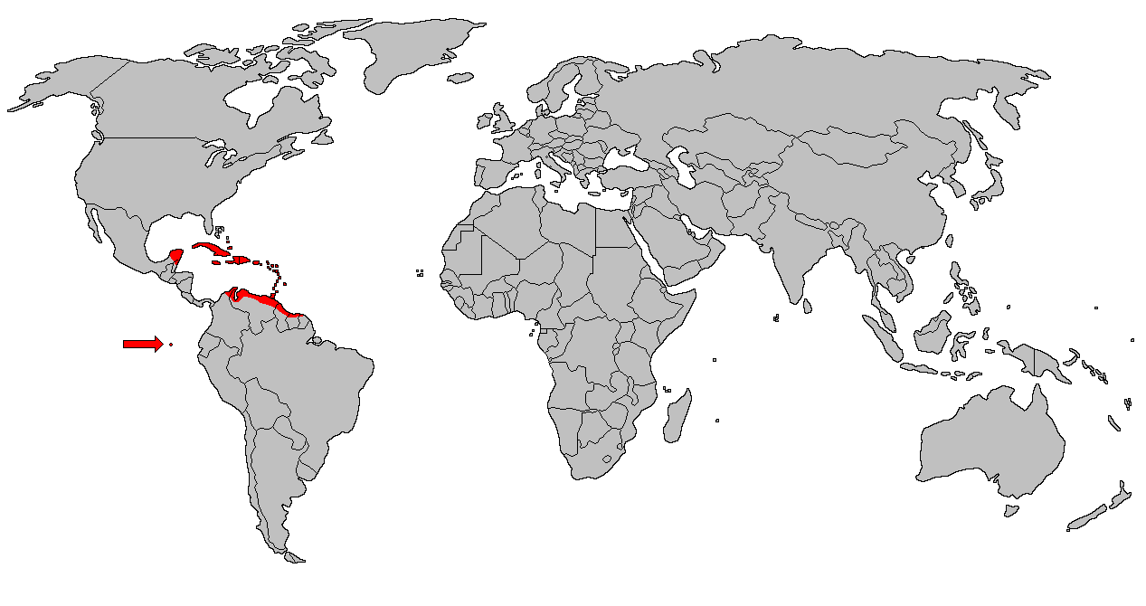 Distribución de Phoenicopterus ruber